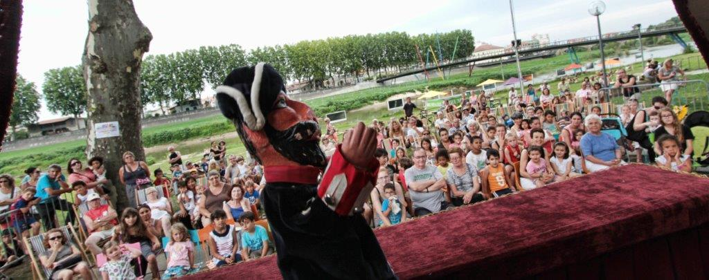 Marionnette du gendarme lors d'un spectacle du Guignol Guerin